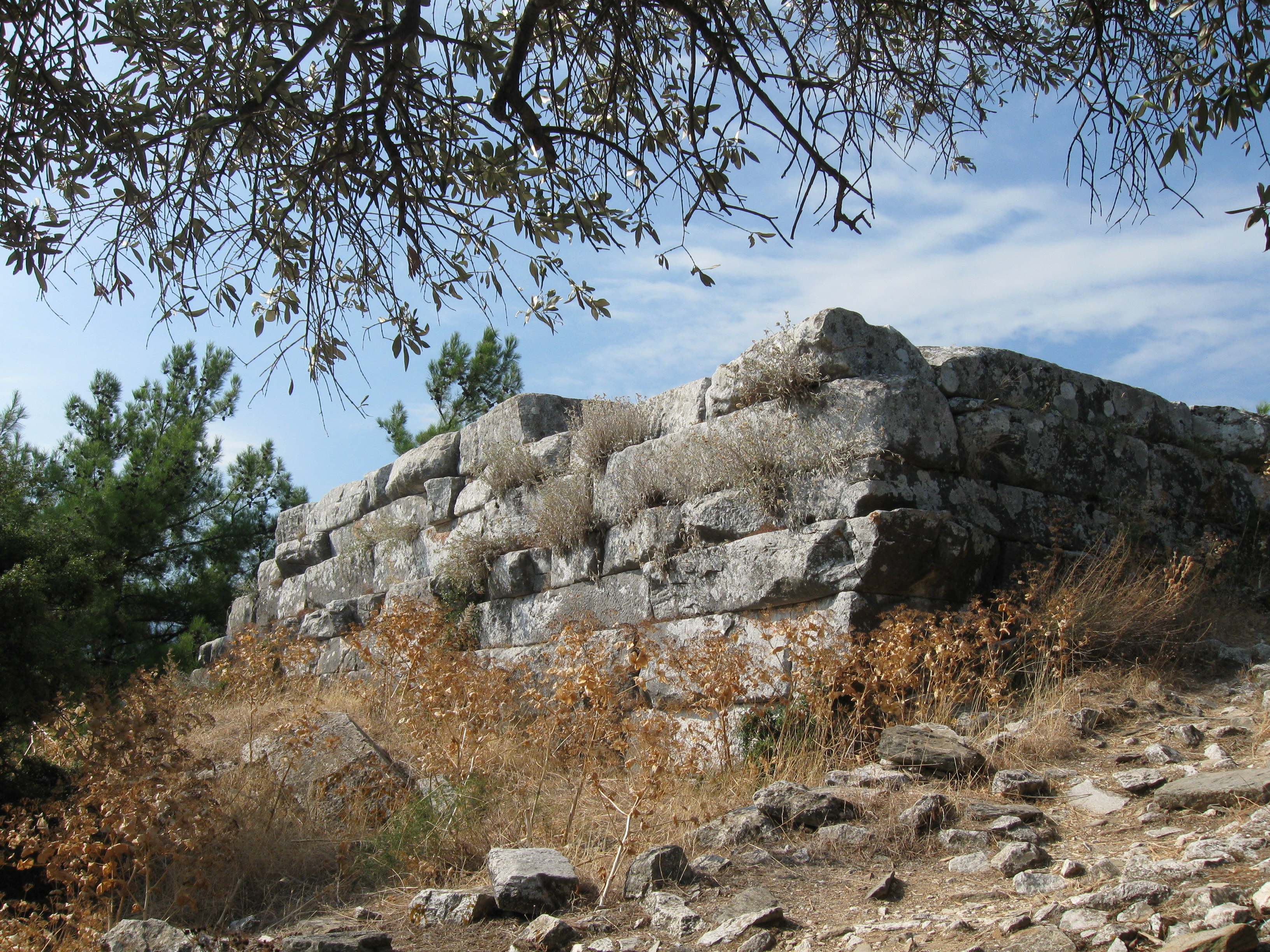 Stützmauer des Athena-Tempels von Südwest